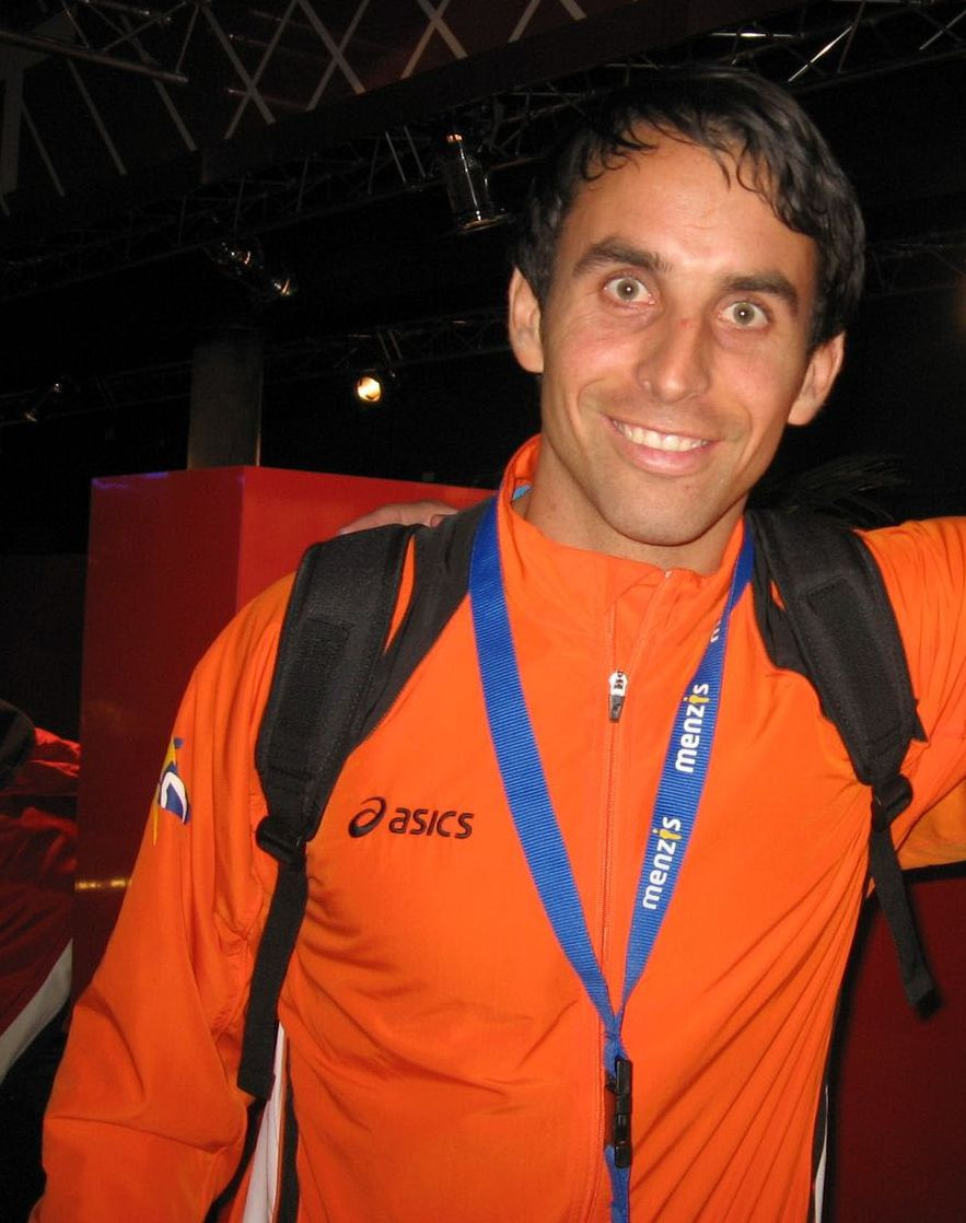 Casper Boom (Hardenberg, 3 maart 1980) is een Nederlands korfbal-international.